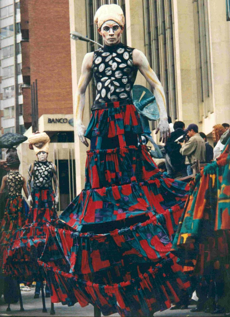 Comparsa Umbral Imaginario en el desfile del Festival Iberoamericano de Teatro de Bogotá del año 2000.